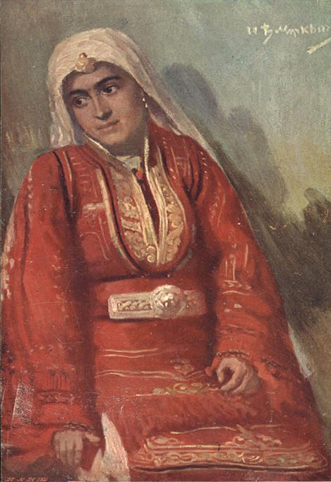 Българка от Смилево.